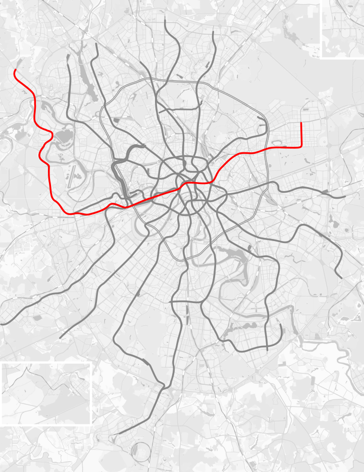 Арбатско-Покровская линия Московского метрополитена